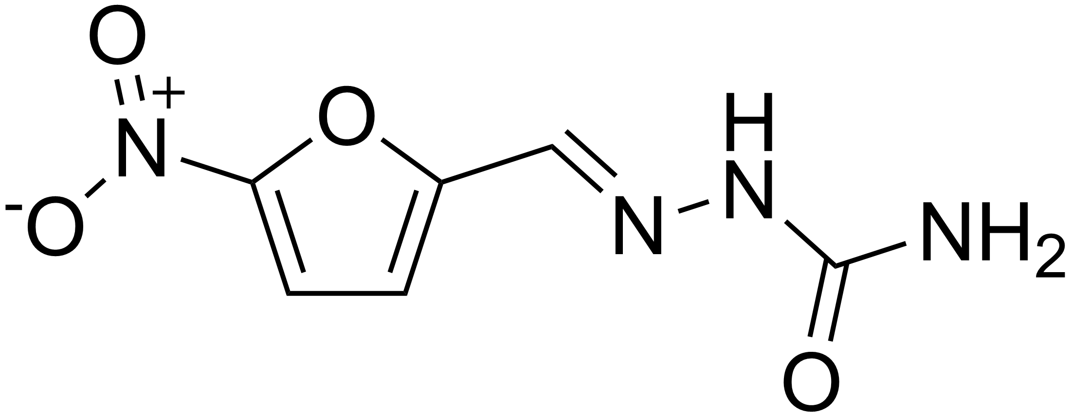 chemical structure of nitrofurazone